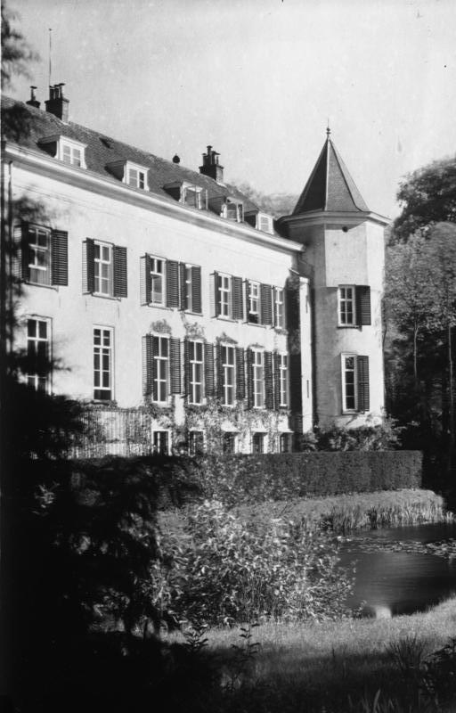 Das Arbeitszimmer im Turm des Exkaisers Wilhelm II in Doorn.